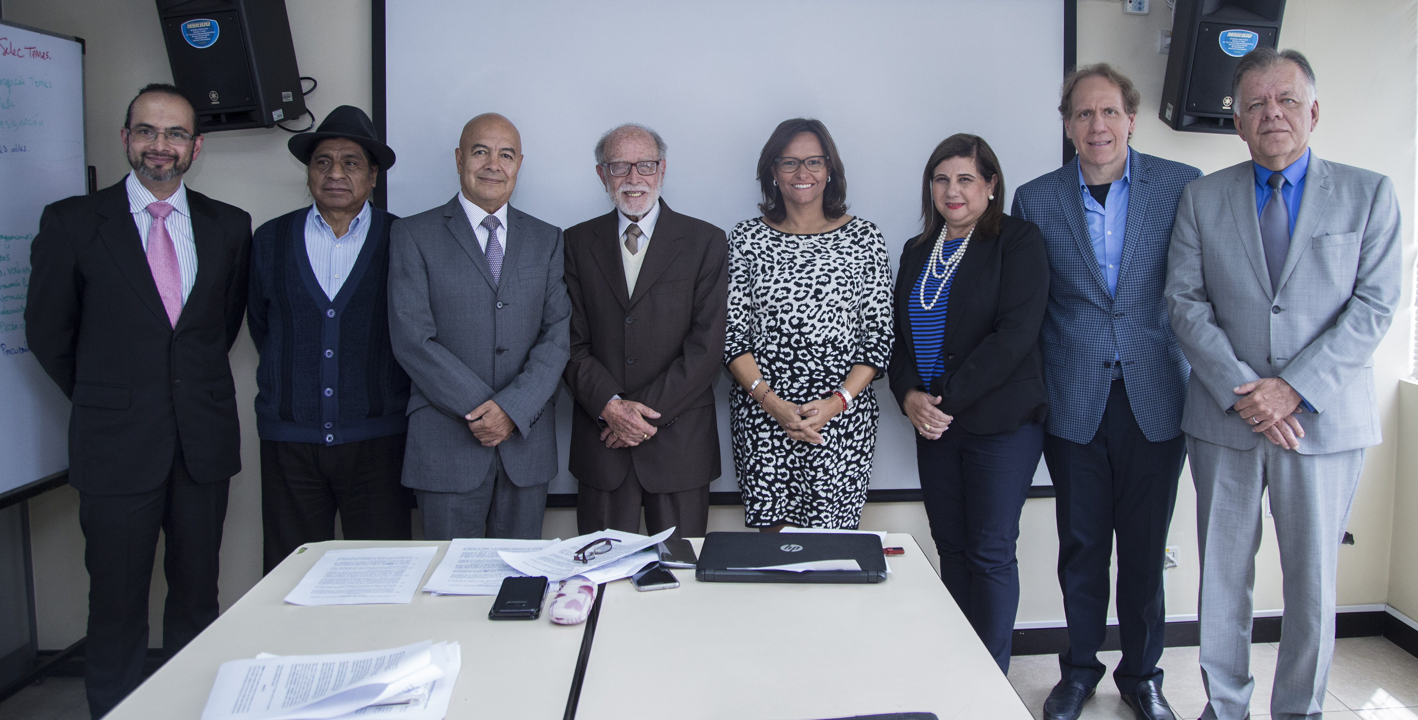 Quito, 02 de mayo 2018.- Elizabeth Cabezas, presidenta de la Asamblea Nacional mantuvo una realizó una visita de cortesía a su homólogo del Consejo de Participación Ciudadana y Control Social Transitorio, Julio César Trujillo, para estrechar lazos de colaboración. Foto: Santiago Armas/Asamblea Nacional. Quito, 02 de mayo 2018.- Elizabeth Cabezas, presidenta de la Asamblea Nacional mantuvo una realizó una visita de cortesía a su homólogo del Consejo de Participación Ciudadana y Control Social Transitorio, Julio César Trujillo, para estrechar lazos de colaboración. Foto: Santiago Armas/Asamblea Nacional.